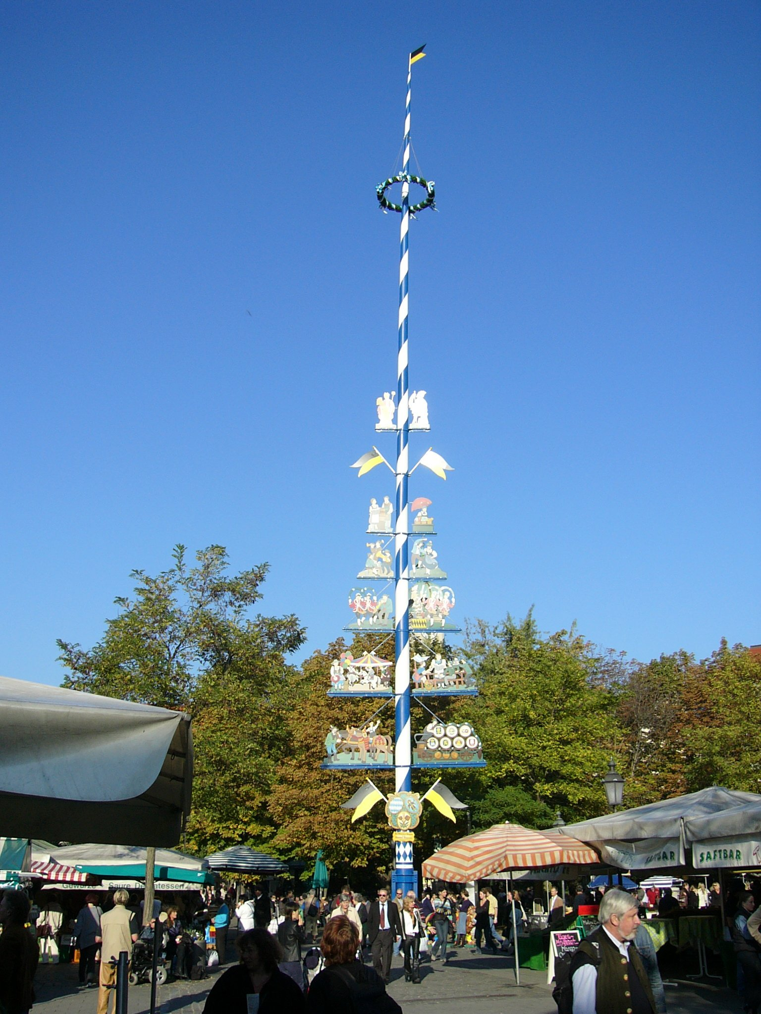 Munich